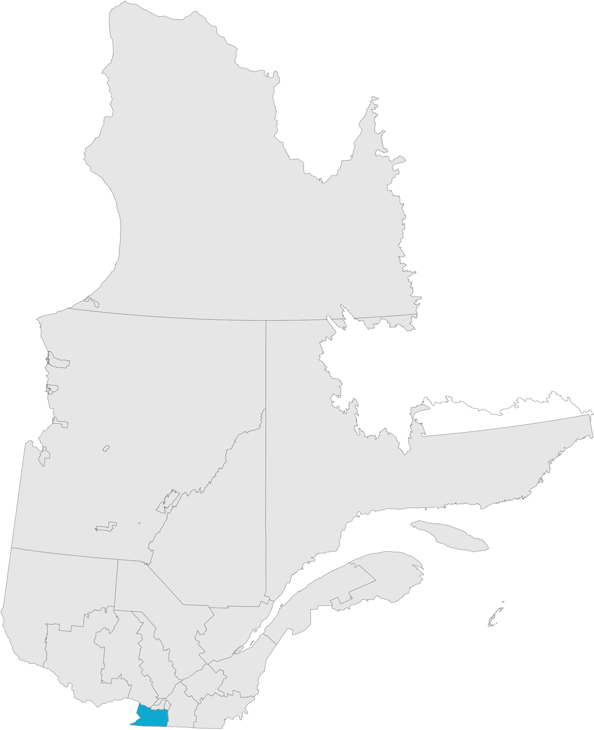 Carte de la CRÉ de la Vallée-du-Haut-Saint-Laurent